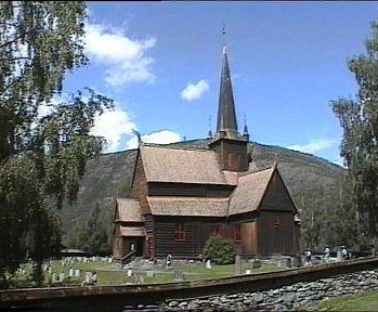 Het staafkerkje van Lom